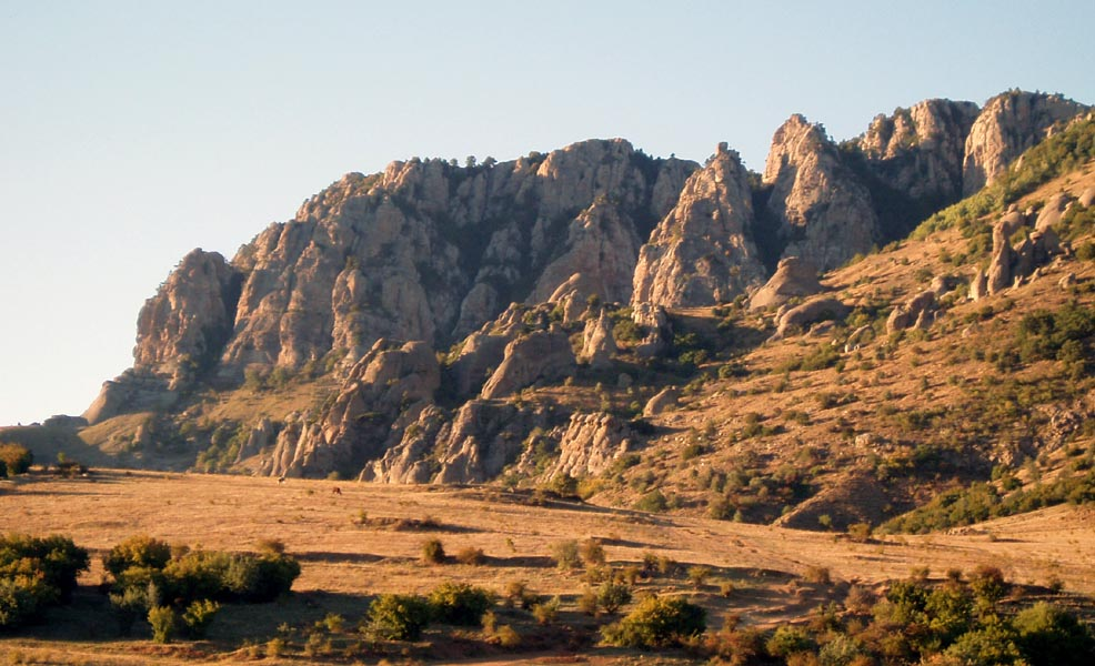 Долина приведений - перед закатом